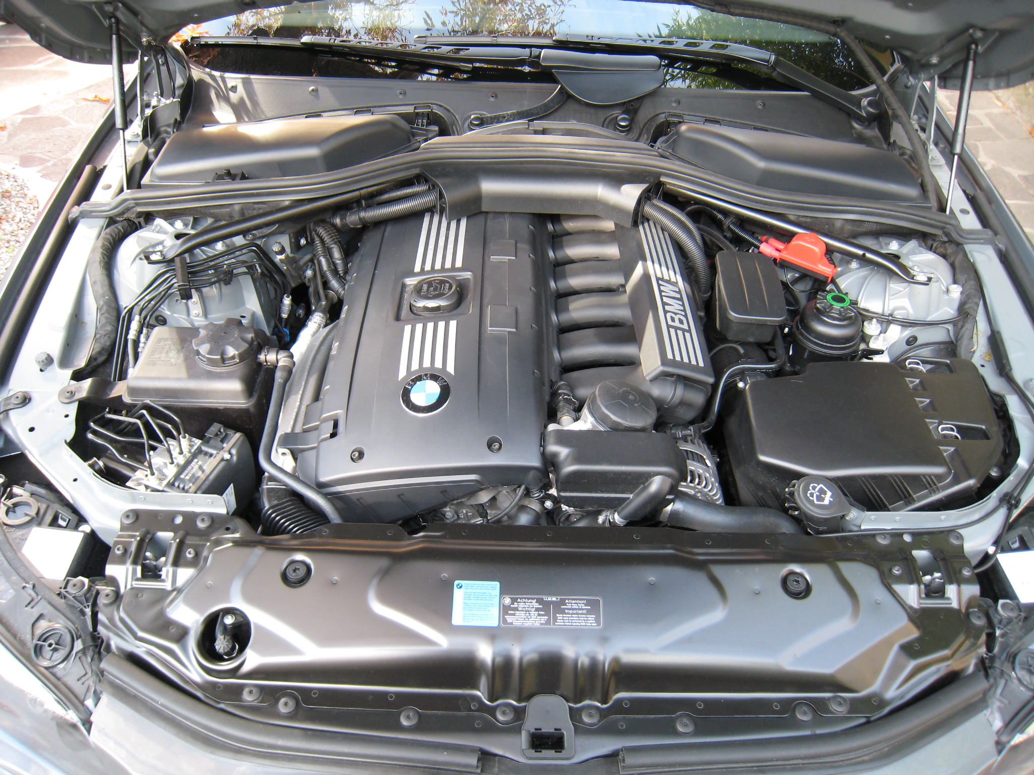 BMW N53B30